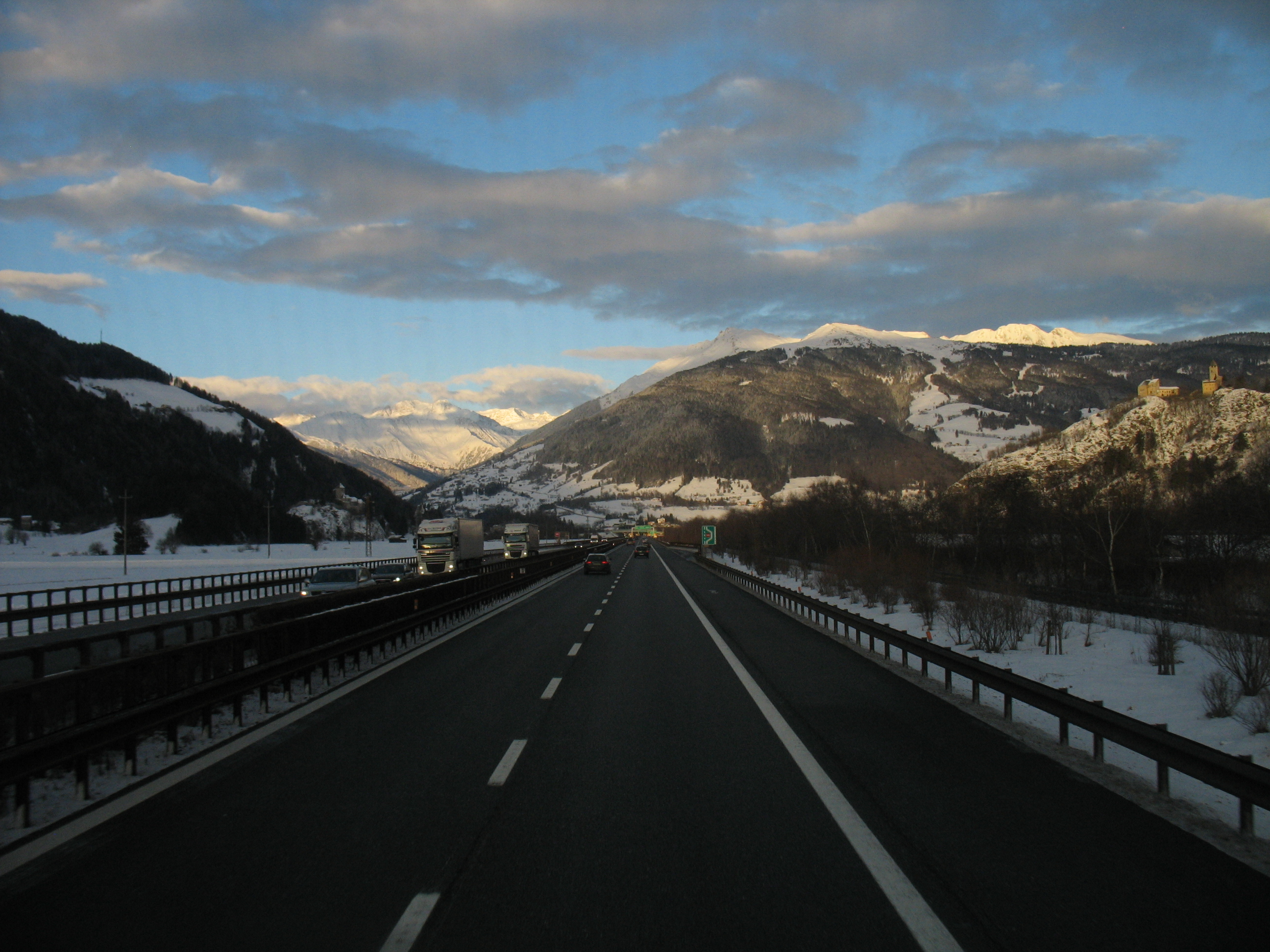 Brennerautobahn bei Sterzing, Nordföhnwetter.